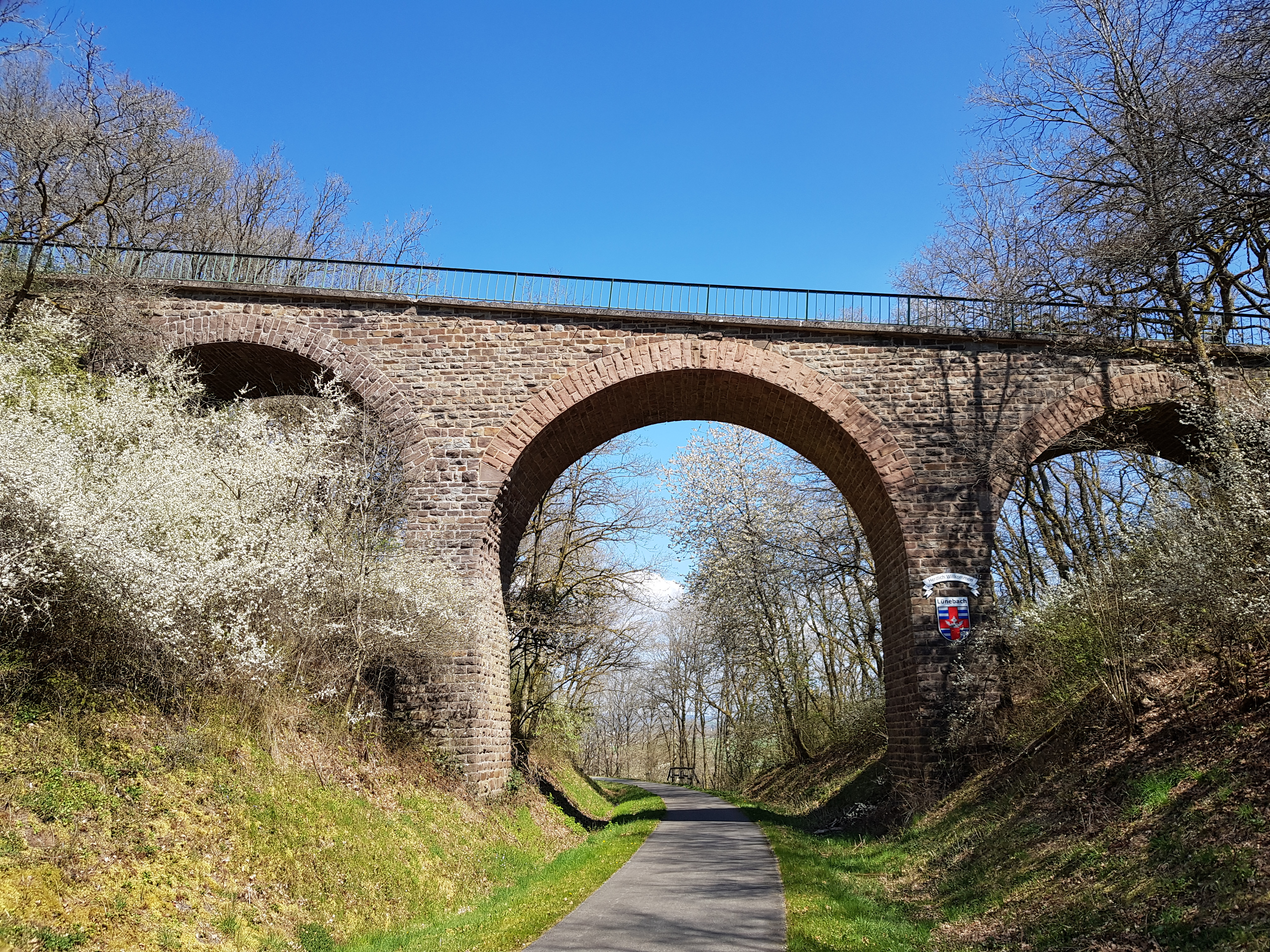 Das dreibogige Viadukt steht nordwestlich von Lünebach.